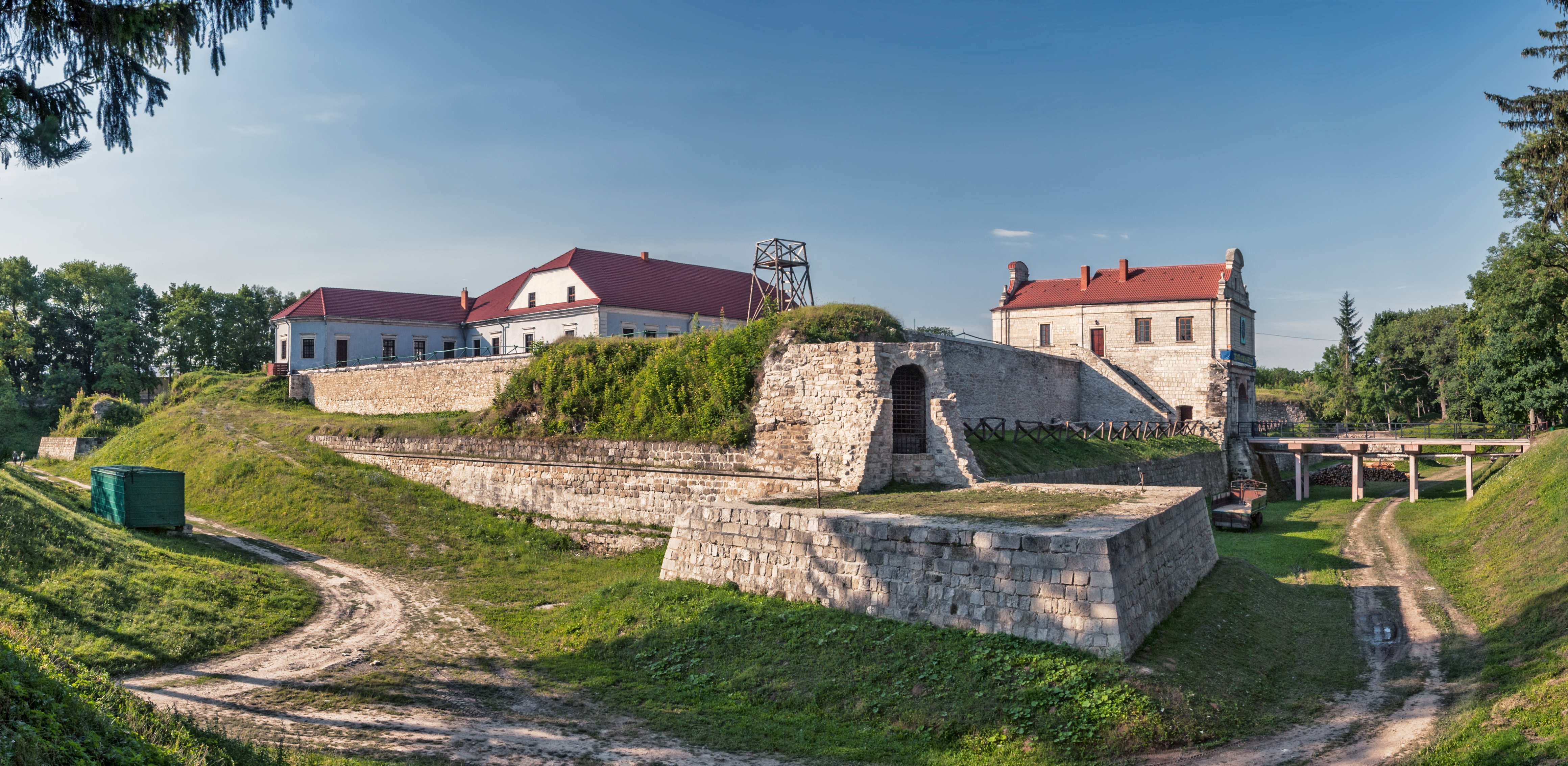 Замок, Збараж, вул. Морозенка, 38